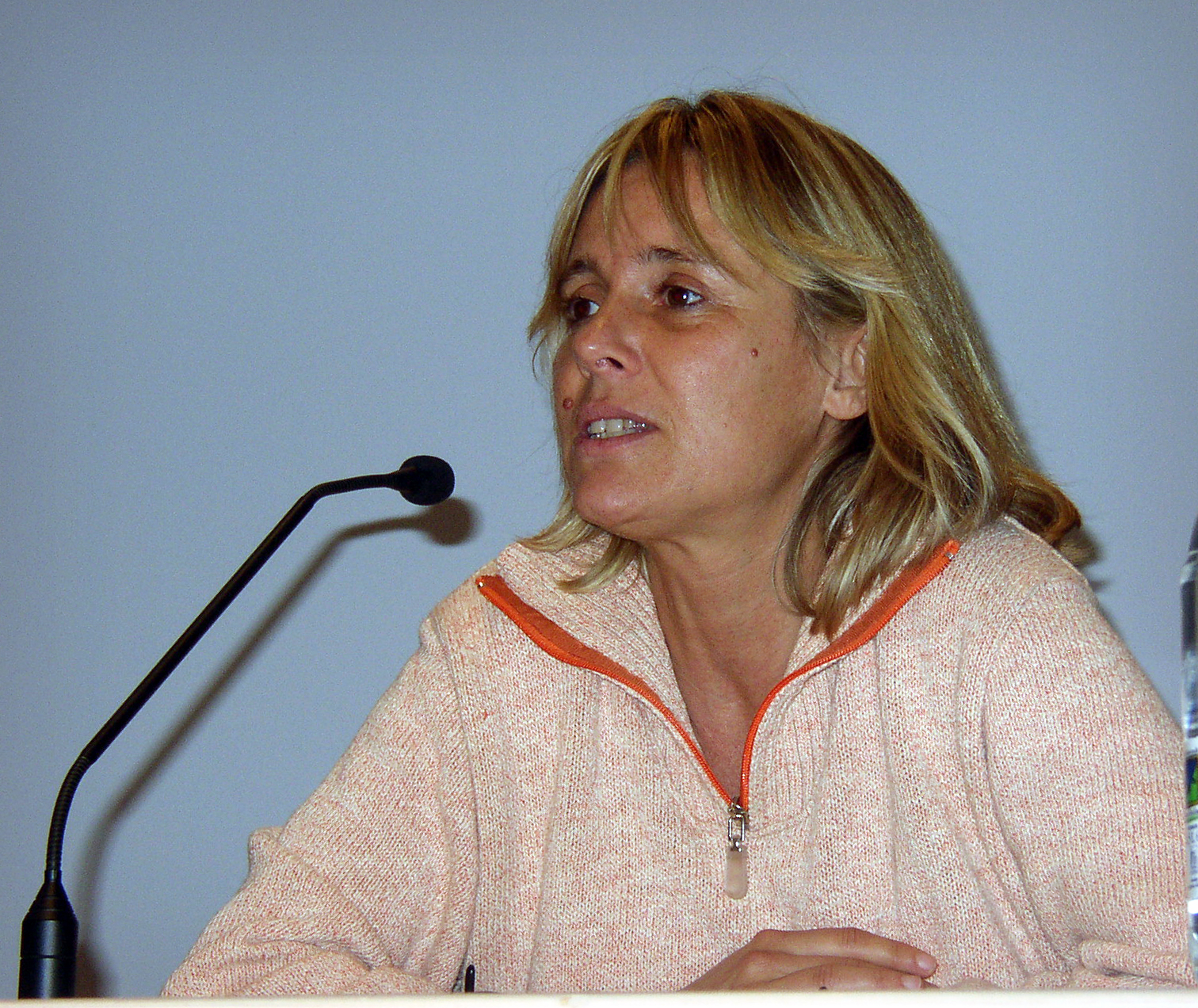 Federica Sciarelli (Tg3), nel corso del suo intervento a Volo Radente, X seminario di formazione per giornalisti organizzato da Redattore Sociale